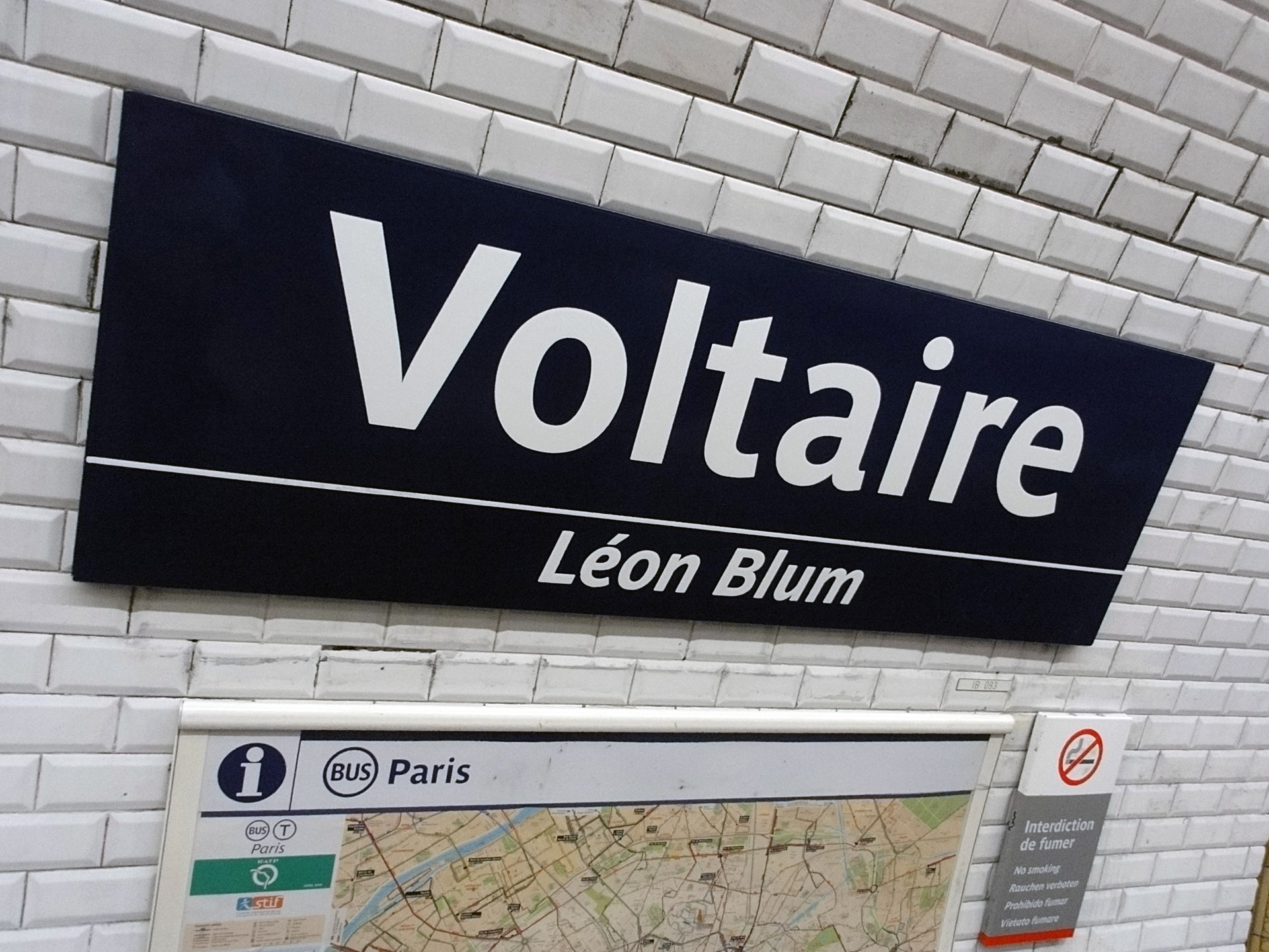 Station Voltaire de la ligne 9 du métro de Paris, France.